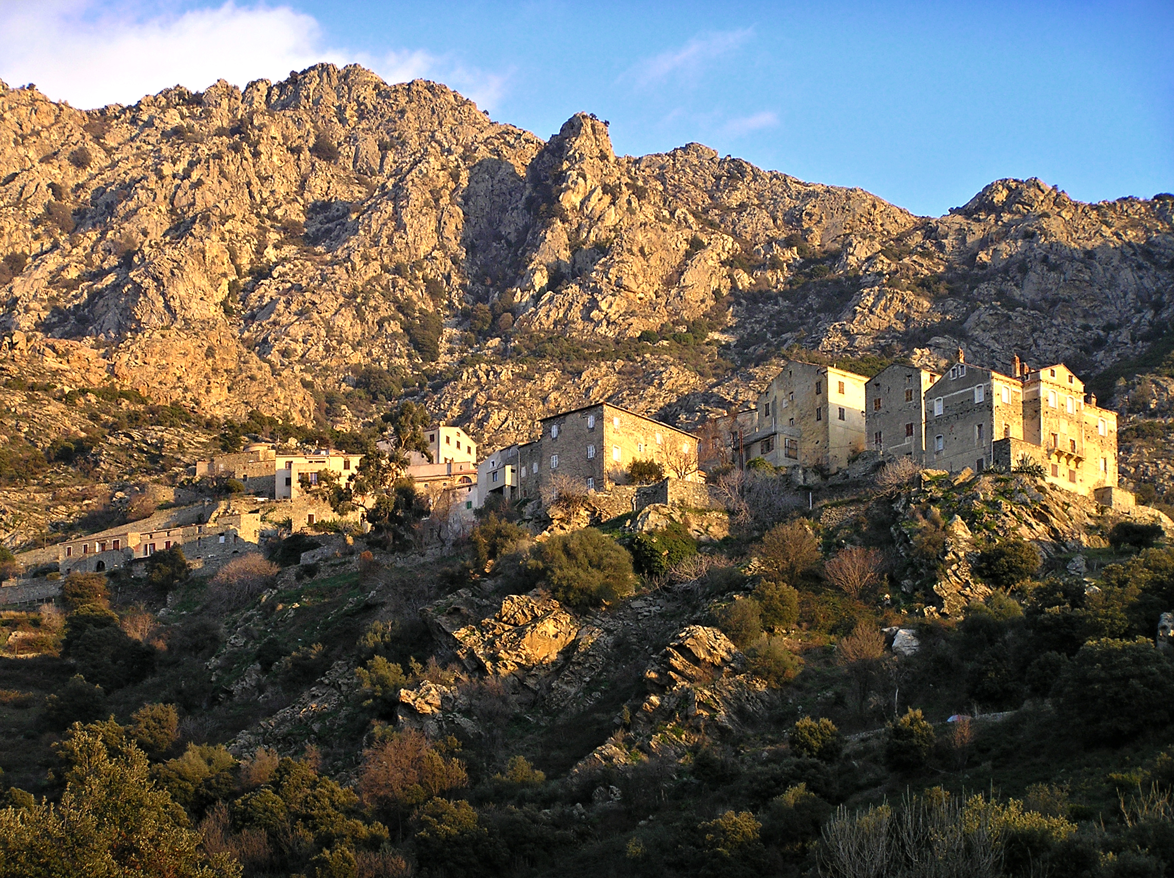 Lama (Corse) - Vue du village